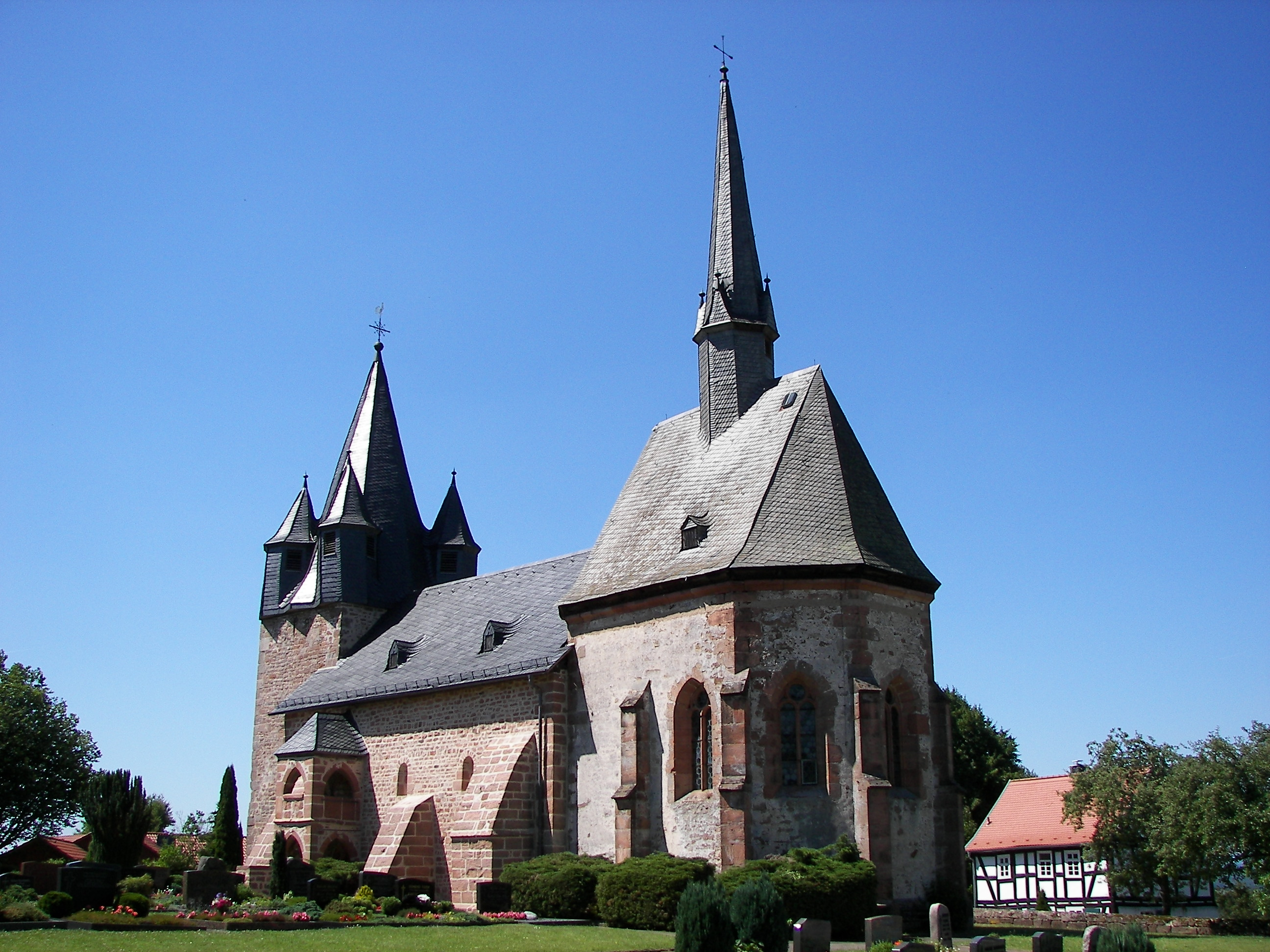 Christenberg, Kirche